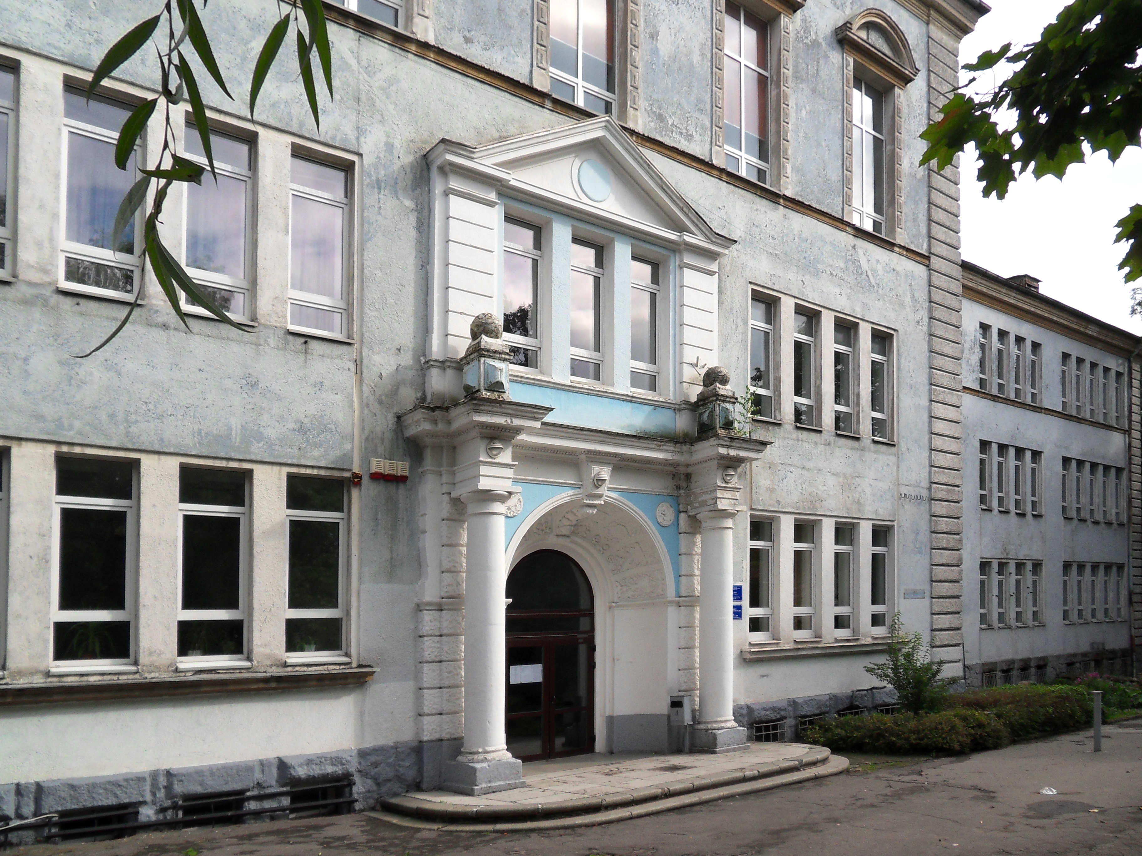 Здание хуфенской гимназии (Калиниградская область, Калининград, зоологическая улица, 2)